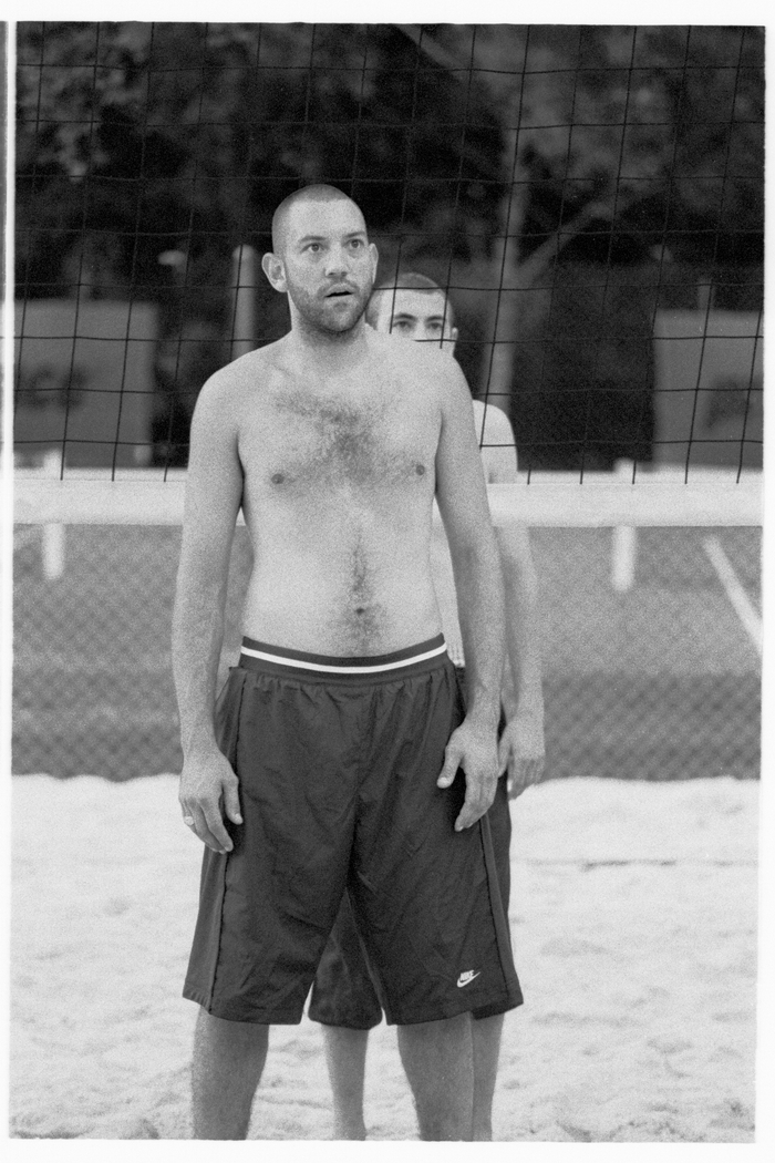 Volleyball